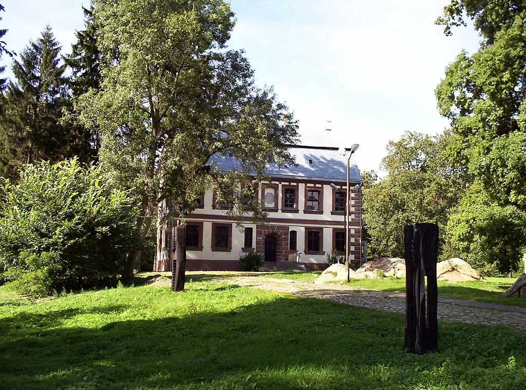 Buk - Dwór Flemingów (ob. Biblioteka Składowa Książnicy Śzczecińskiej)